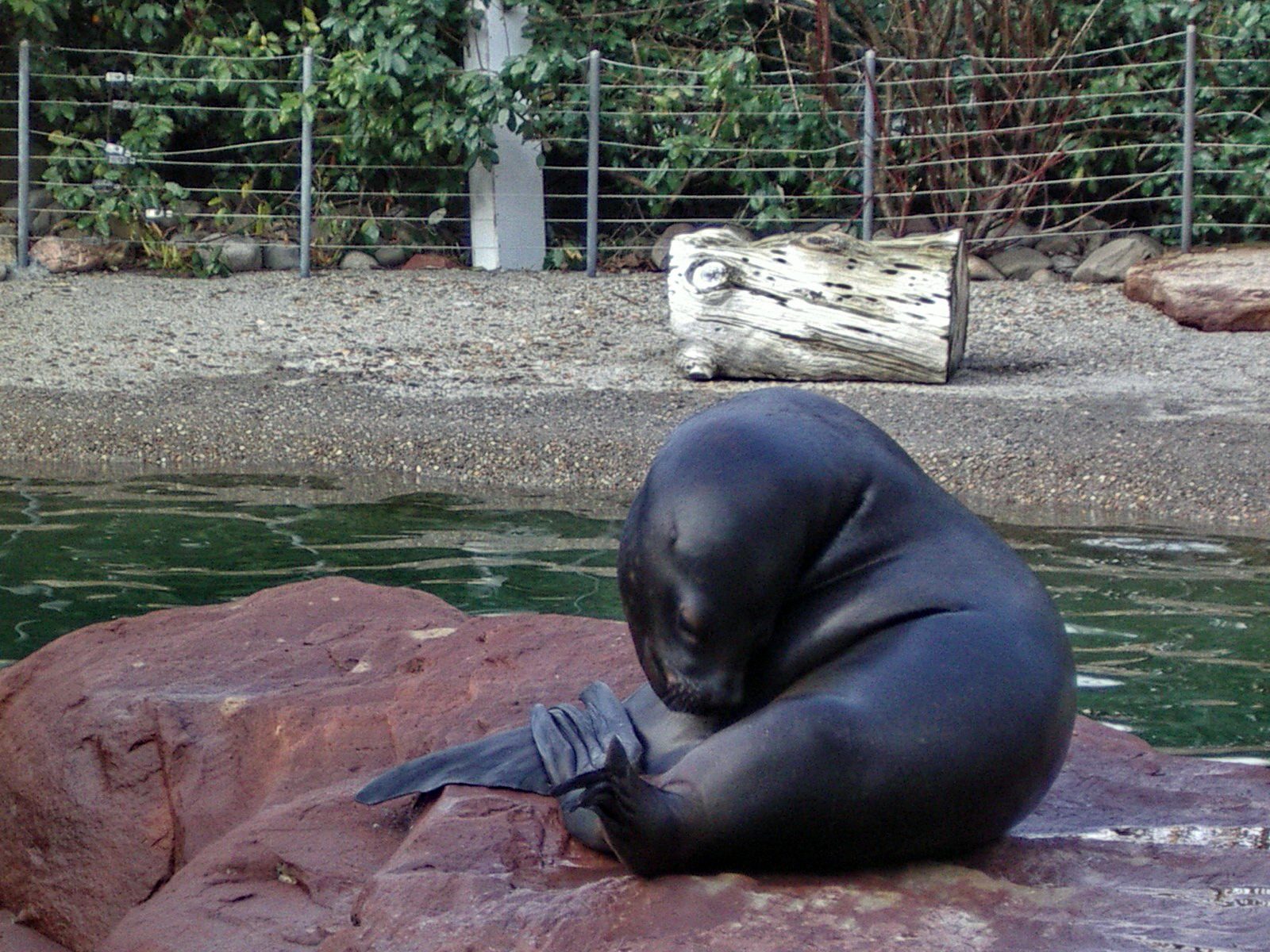 Otarie à crinière (Otaria flavescens) au zoo de Mulhouse